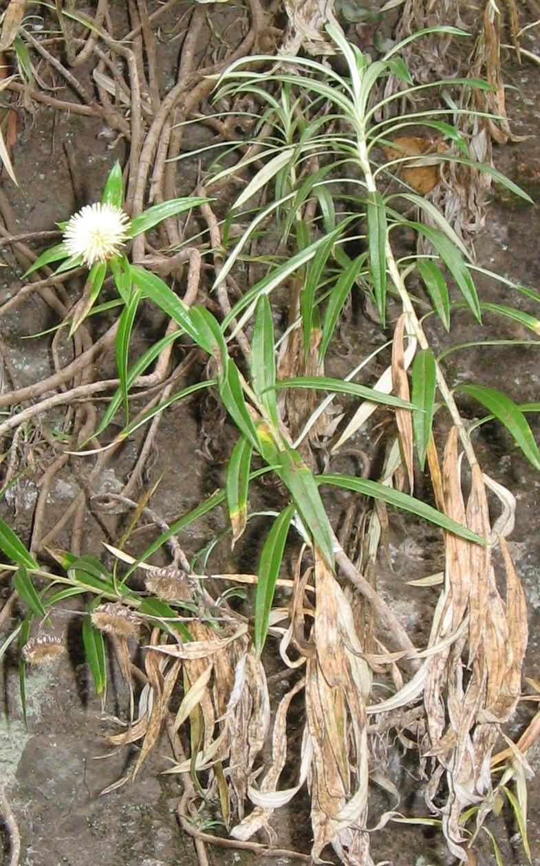 Carlina falcata = Carlina salicifolia(Endémique de La Palma)